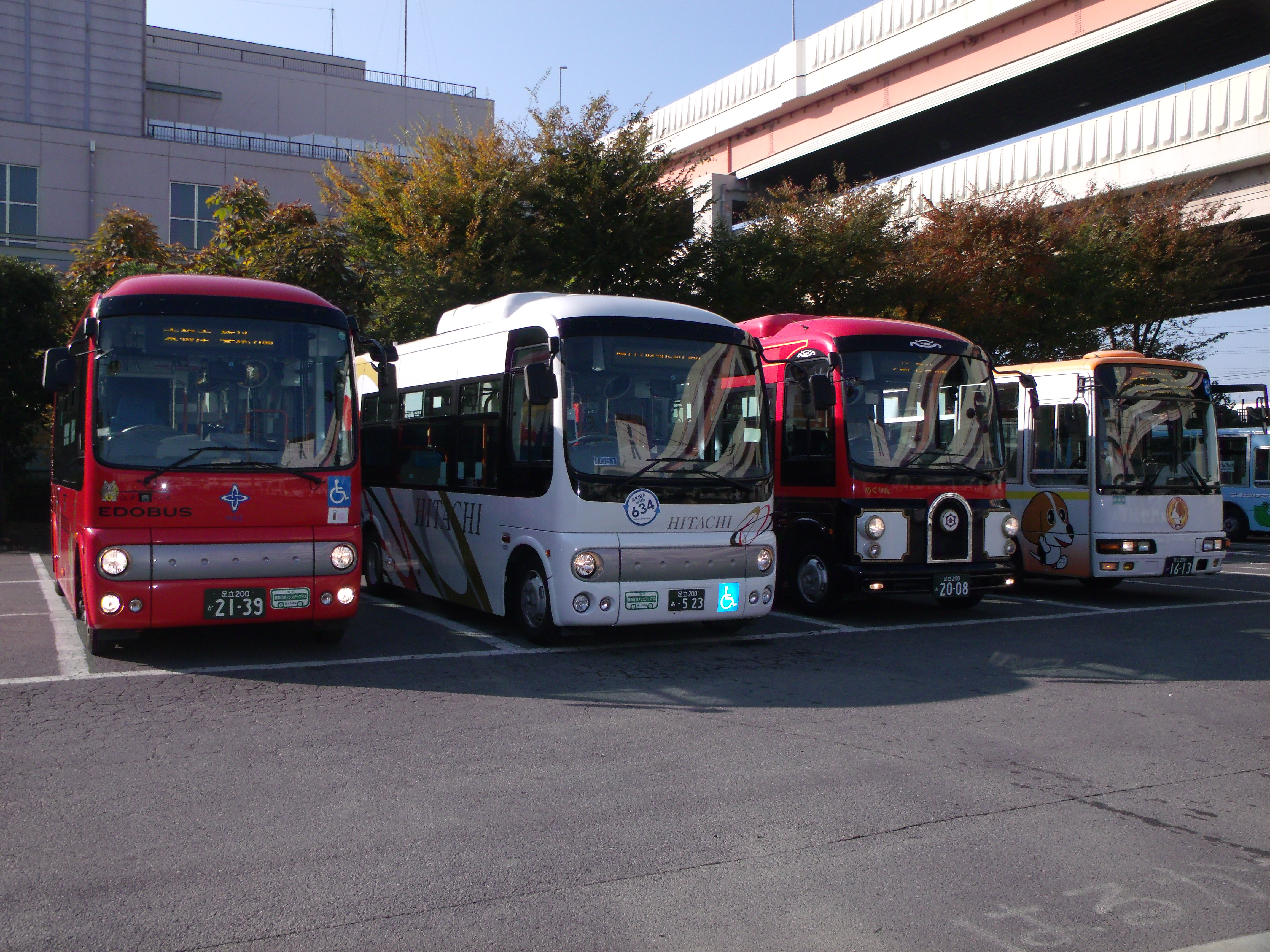 車庫に揃った日立自動車交通の7mバス 左から江戸バス、日立カラー、めぐりん、B〜ぐる